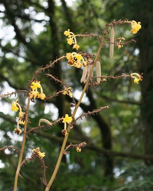 山珊瑚 - Galeola falconeri